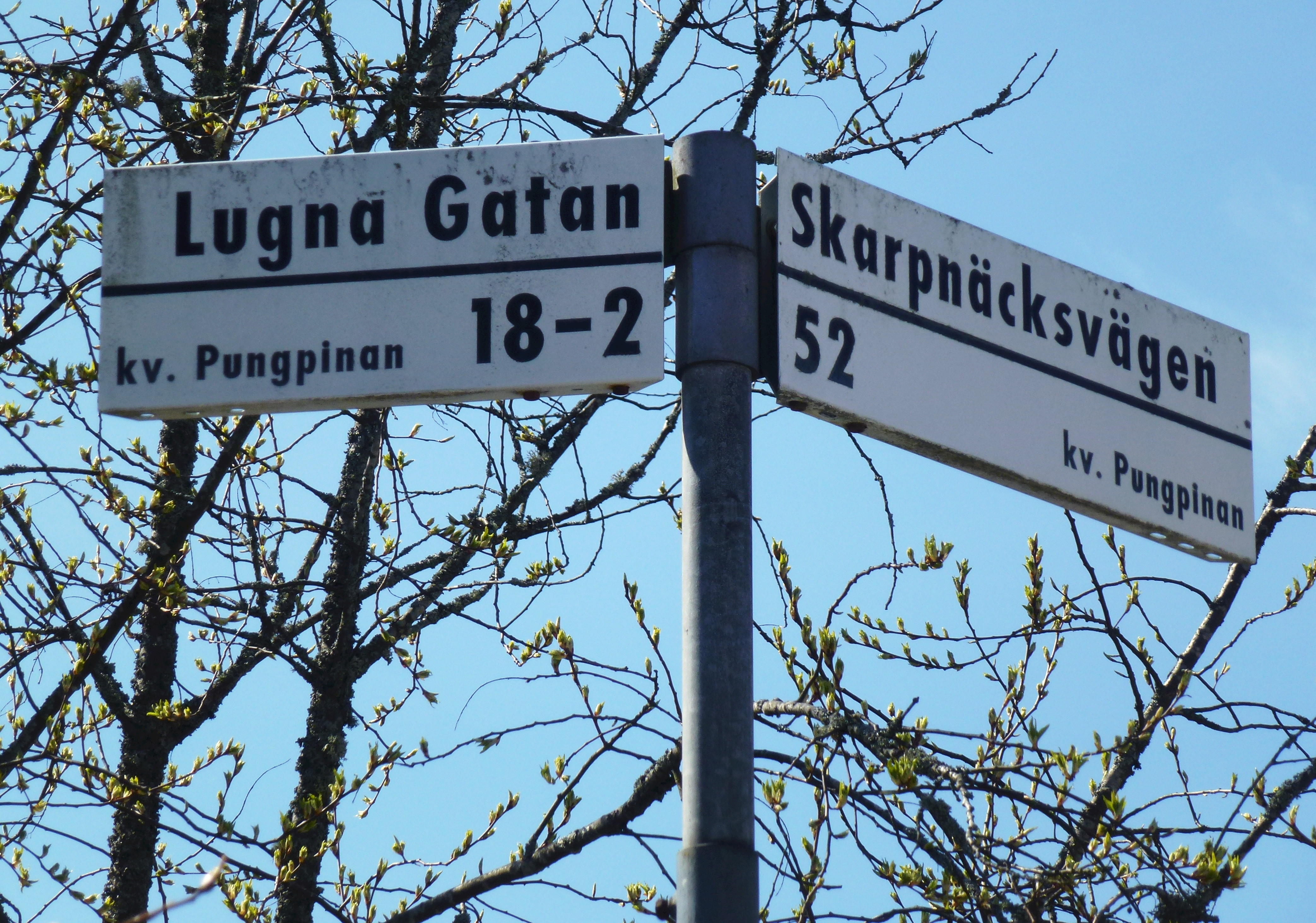 Pungpinetorpet, gatuskylt